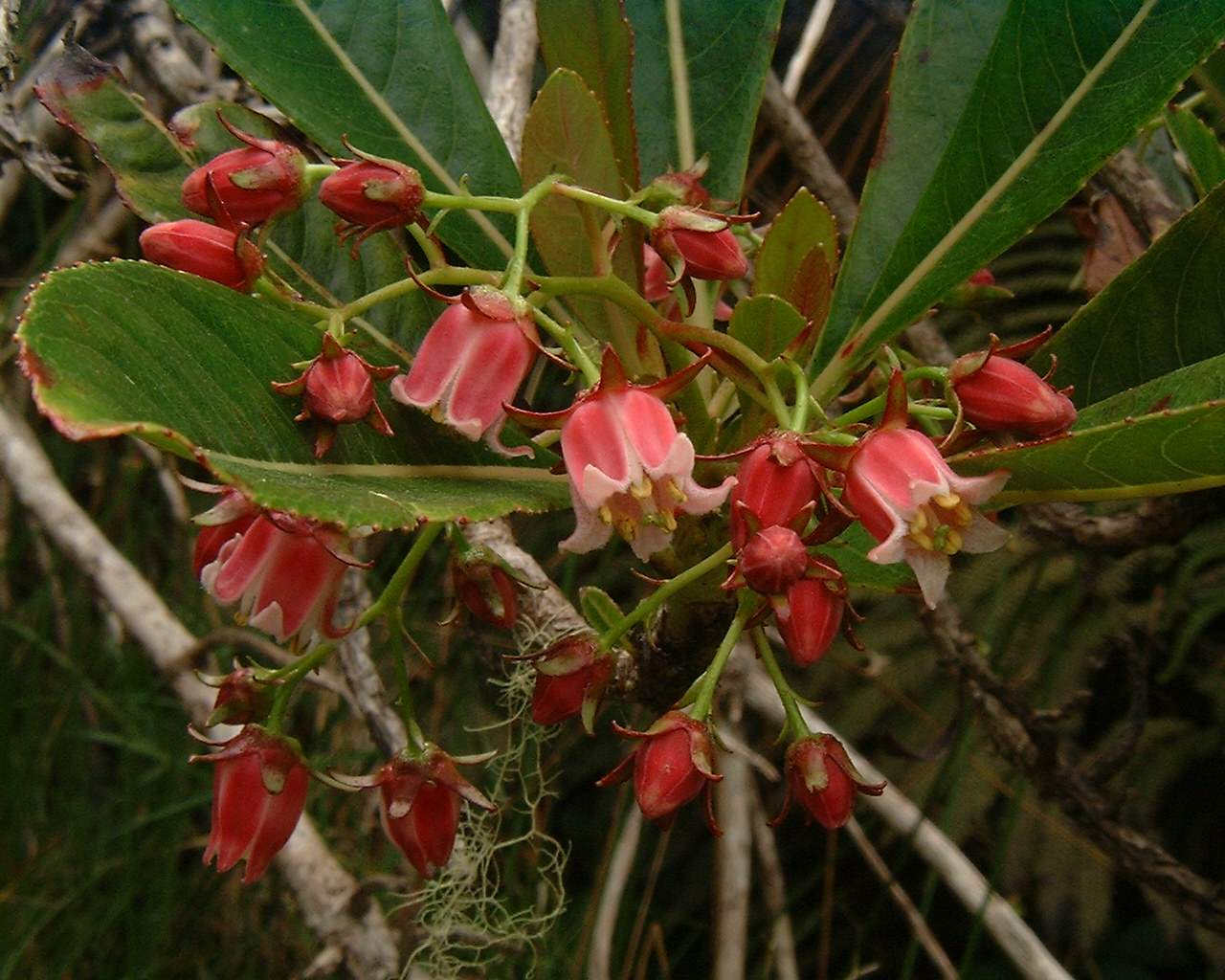 Forgesia racemosa (Le nom local est "bois de laurent-martin") photo : B.navez - Ile de La Réunion - 02 NOV 2003